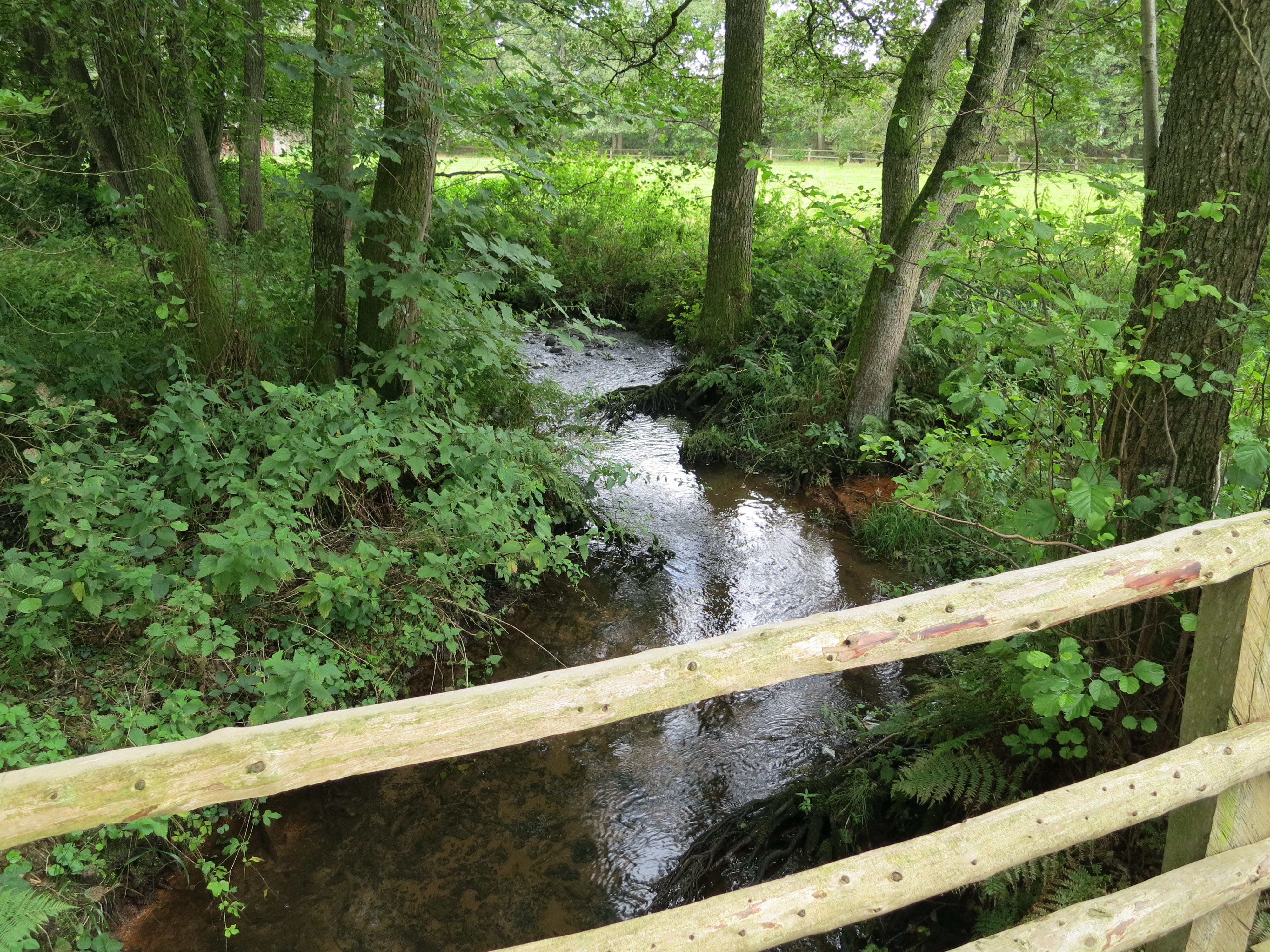 Der Umfluter der Schmalen Aue am Mühlenteich der Sudermühle in Egestorf-Sudermühlen